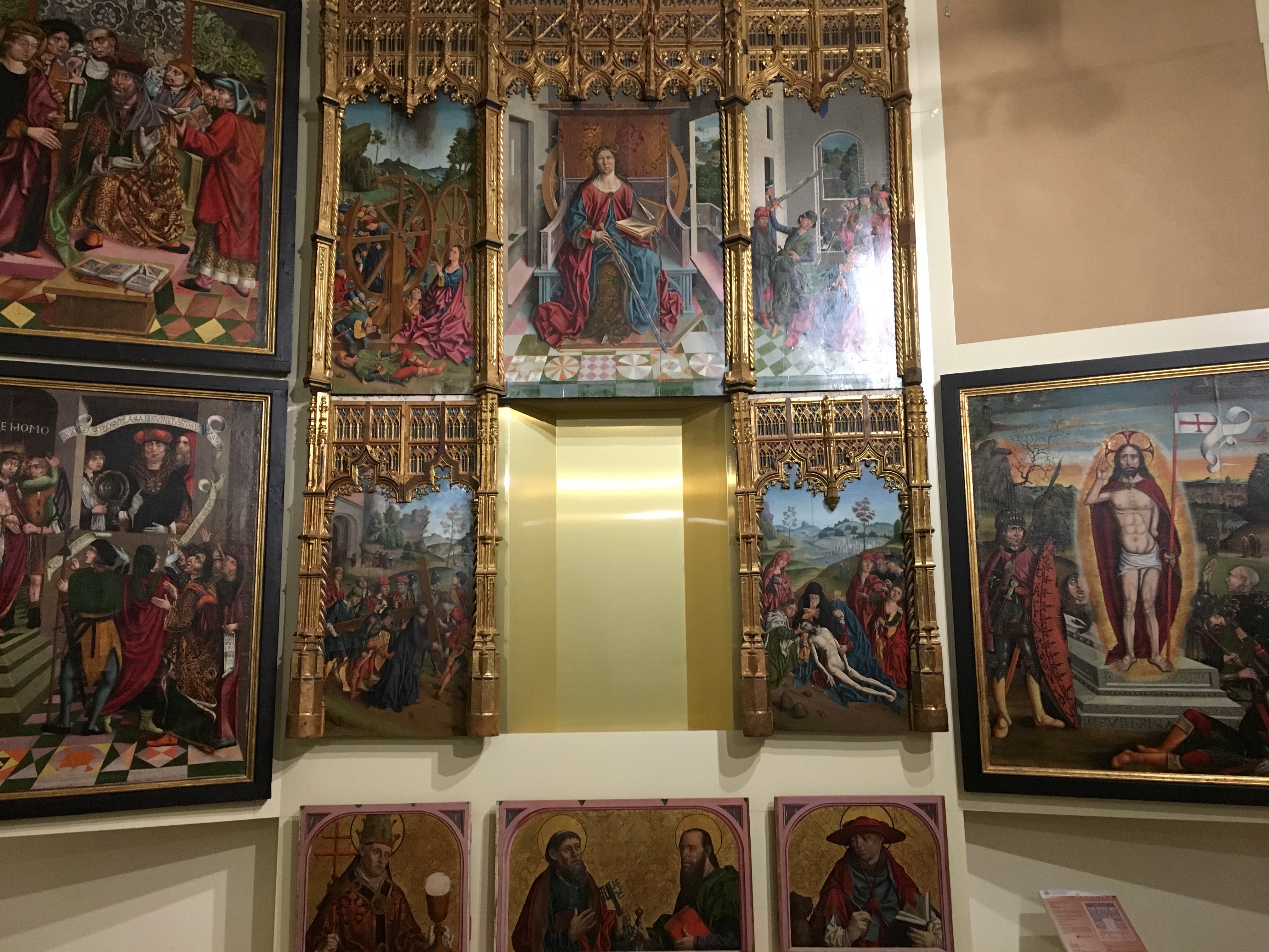 Fernando Gallego y taller. Retablo de Santa Catalina. Museo Diocesano de Salamanca.